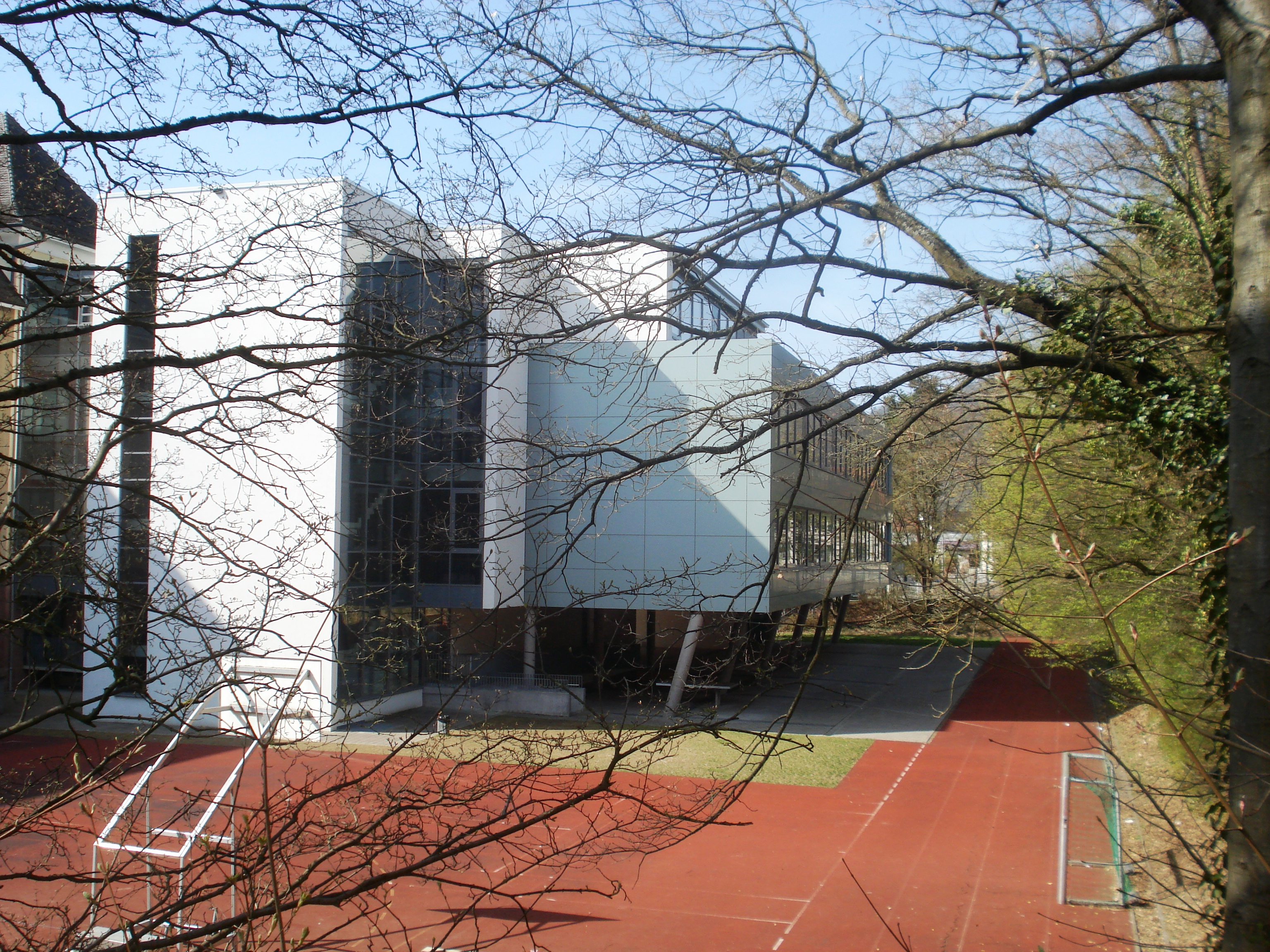 Moderner Nord-Anbau des Hegau-Gymnasiums Singen. Die Fläche des so genannten Roten Platzes wurde dadurch verkleinert.